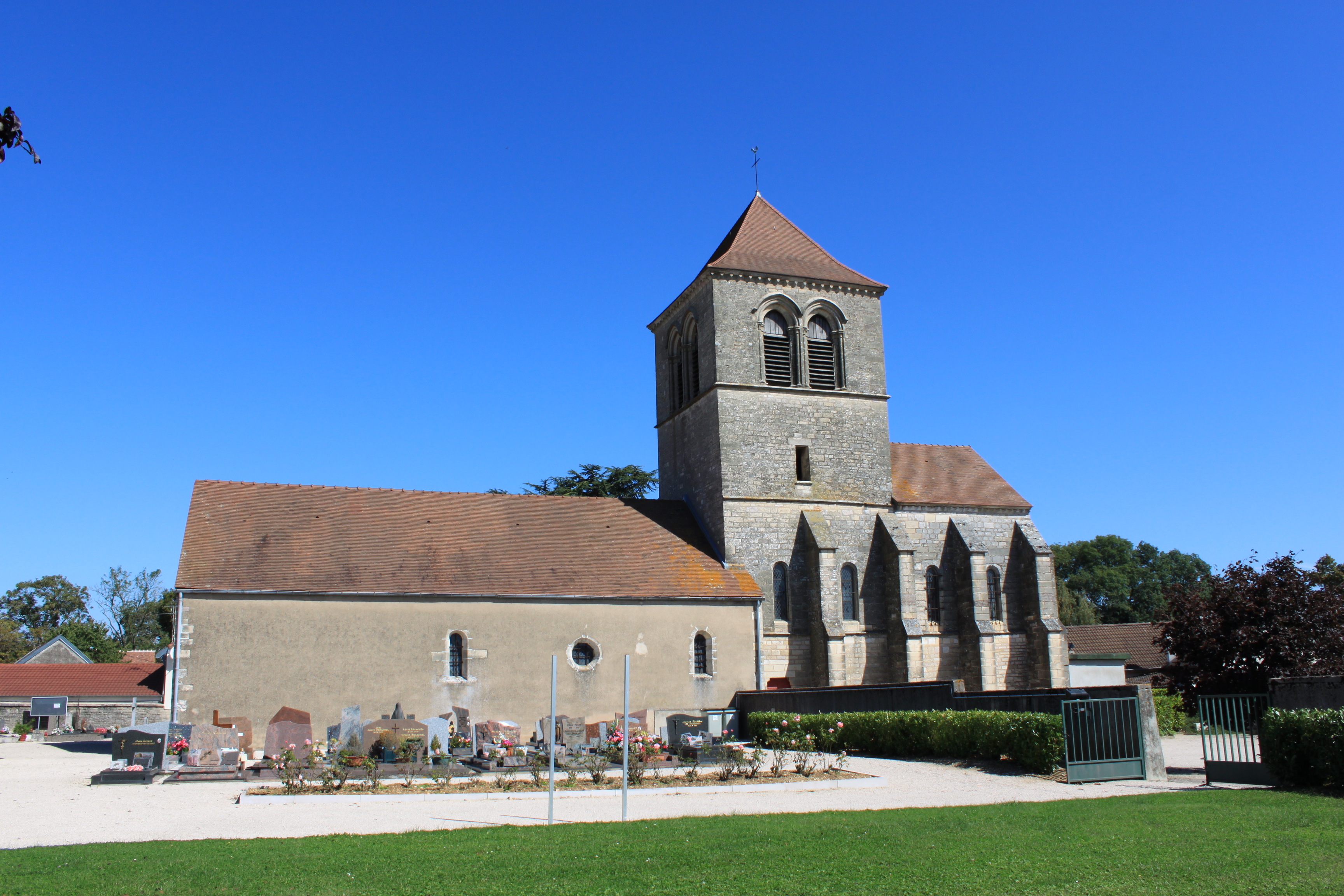 Eglise, Ouges, Bourgogne, France